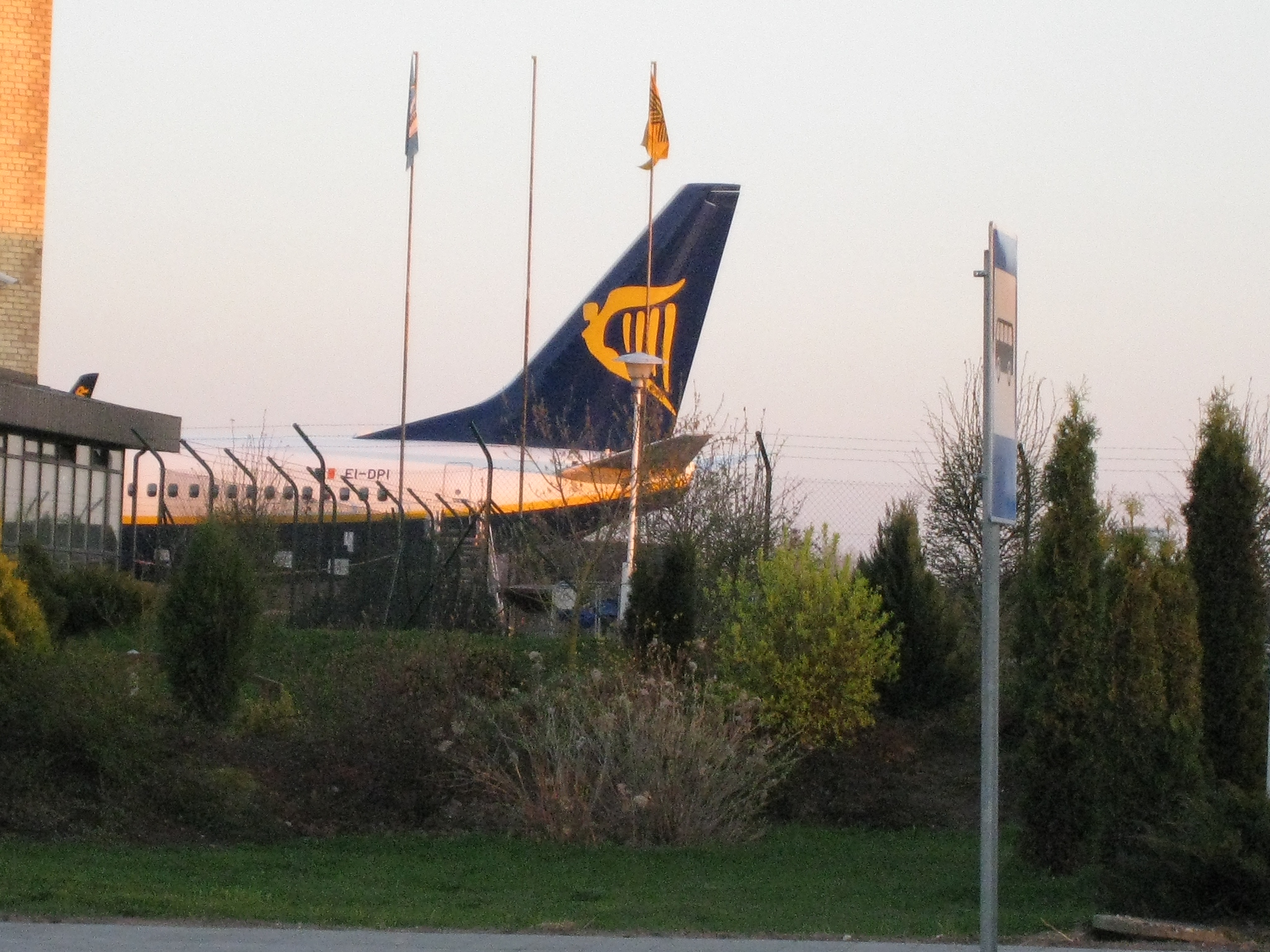 Ryanair at Kaunas airport